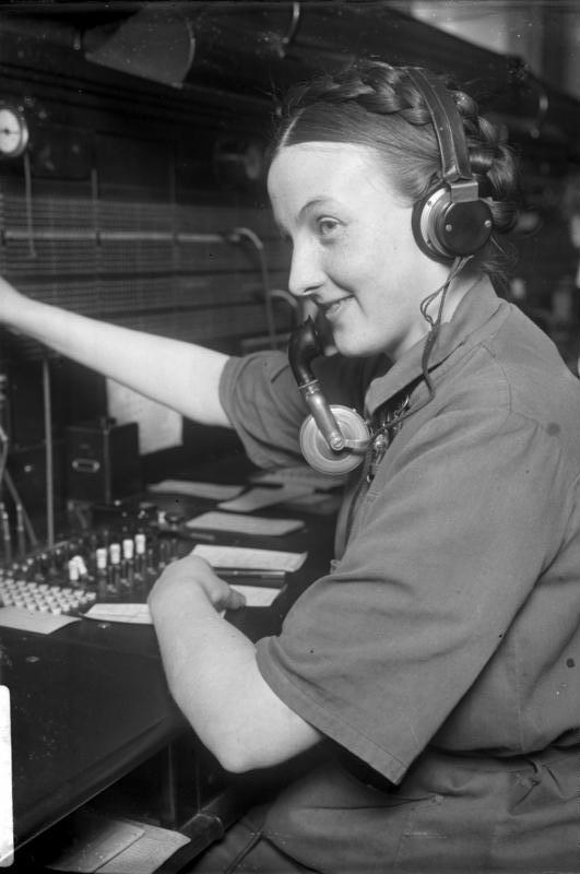 Die keinen Sonn- und Feiertag kennen! Nicht allen Menschen ist es gegönnt, nach 6 tägiger Arbeitslast am Sonn- oder Feiertag auszuruhen. Bei Feuersgefahr muss die Feuerwehr zur Stelle sein, ohne Polizei wäre es nicht auszudenken und bei Unfällen sind es die Rettungsstellen, die Opferbereit die erste Hilfe leisten. In den Krankenhäusern, eine der notwendigsten Einrichtungen muss stänig ein Arzt, Krankenschwestern- und Wärter für die Pflege der Kranken da sein und ohne den Heizer an der Heizungsanlage des Elektrizitätswerkes könnten die allerwenigsten auskommen. Ein für die Grossstadt wichtigen Dienst übt auch die Telefonbeamtin aus. Das sind nur wenige von den Vielen, die keinen Sonn- und Feiertag kennen. -Die Telefonistin, beim Versehen ihres Sonntagsdienstes.